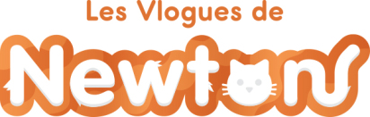 Logo officiel de la web-série "Les Vlogues de Newton".